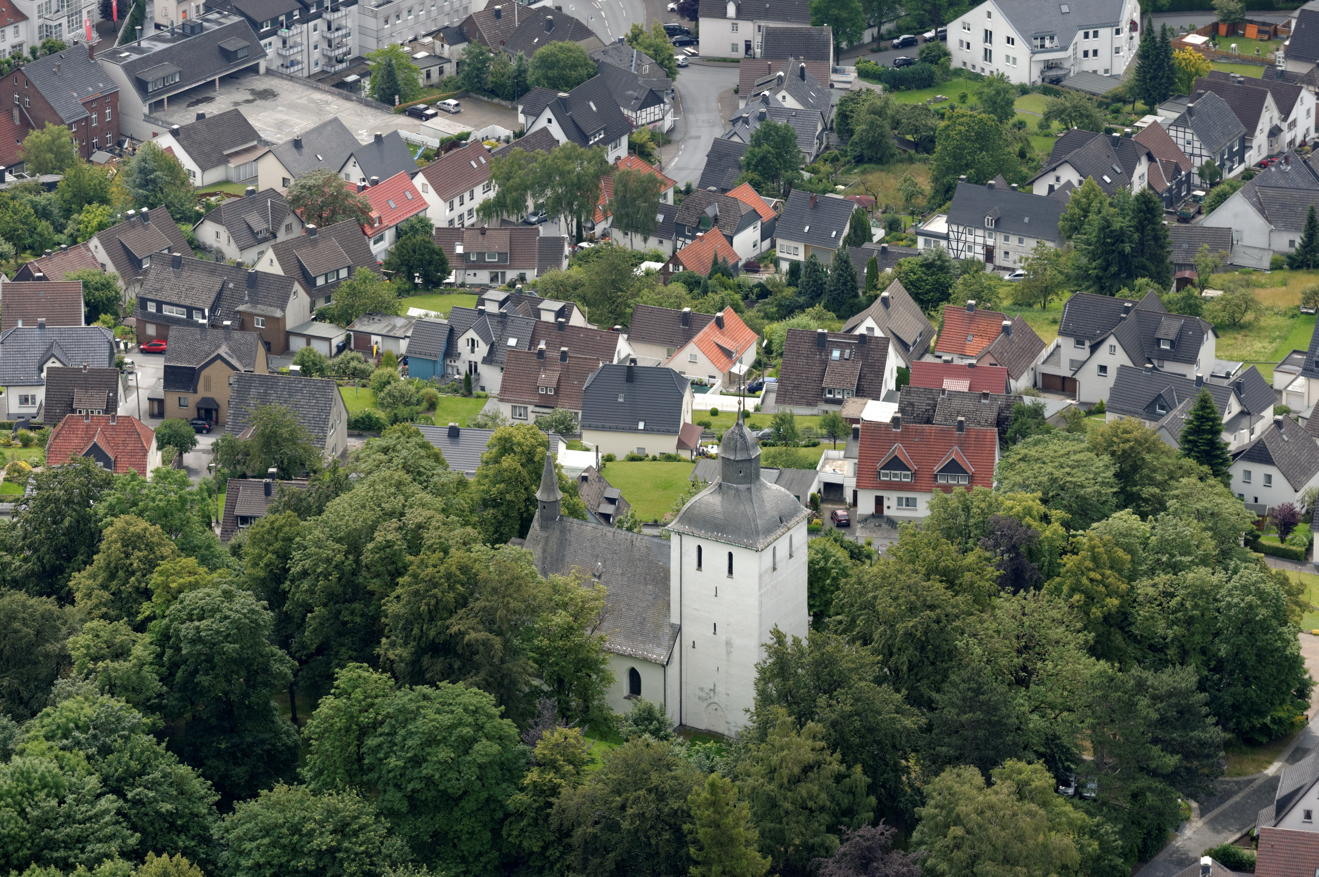 Fotoflug Sauerland-Nord. Alte Kirche St. Pankratius und Sebastian (Warstein) The making of this document was supported by the Community-Budget of Wikimedia Germany.